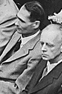 Rudolf Hess en Joachim von Ribbentrop in het Proces van Neurenberg.